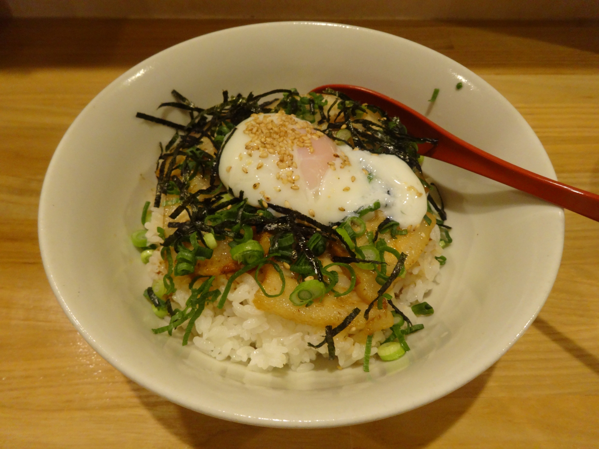 温たまらん丼（鹿児島県指宿市、元祖指宿ラーメン二代目より撮影）